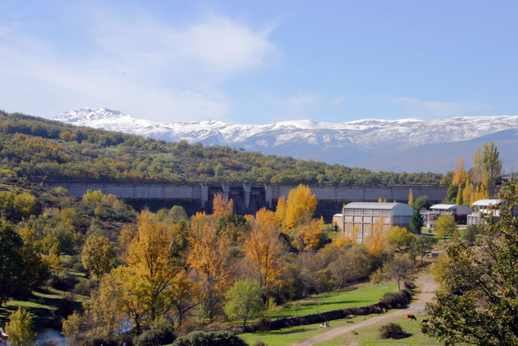 La presa de Pinilla es una pieza importante de un aprovechamiento hidroeléctrico, derivando su caudal, en lugar de por el río Lozoya, por un canal lateral hasta el arroyo de Canencia, donde podía establecerse un salto de agua para aprovechar el nivel ganado por el canal en relación al río, y verter a éste para su posterior ingreso en el embalse de Riosequillo.